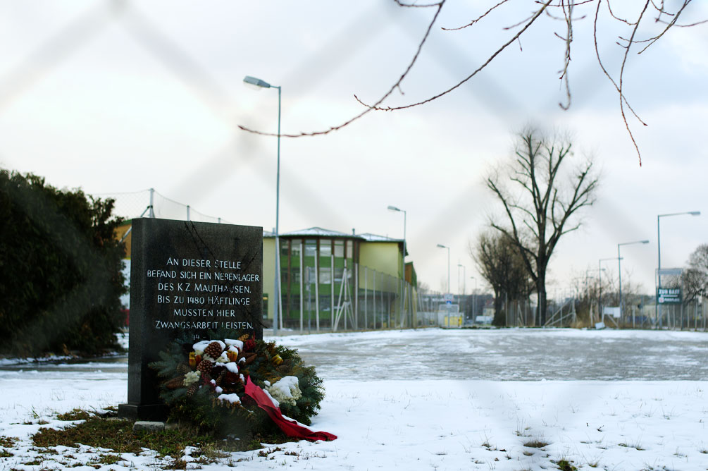 Gedenktafel KZ-Mauthausen/Nebenlager, Saurer-Werke-West, Ecke Haidestrasse/Haidequerstrasse